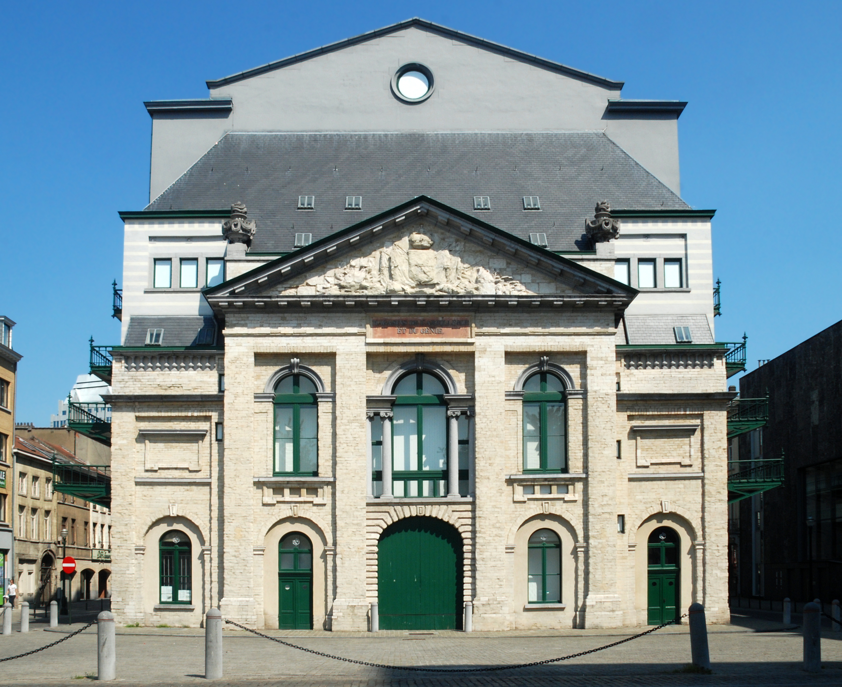 Belgique - Bruxelles - Ancien arsenal (néoclassique, architecte Rémy Nivoy, 1780-1781)